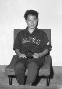 Yoshiko Takamatsu in Rome